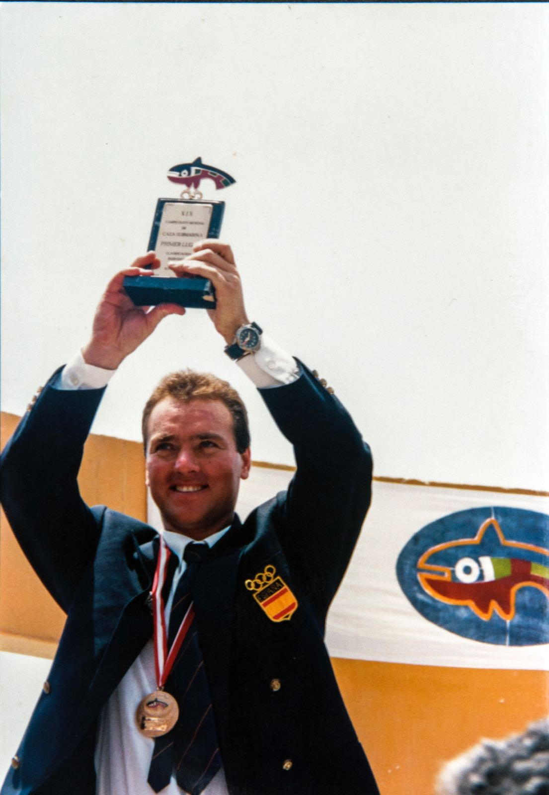 Entrega de trofeo de campeon del mundo 1994 en Peru